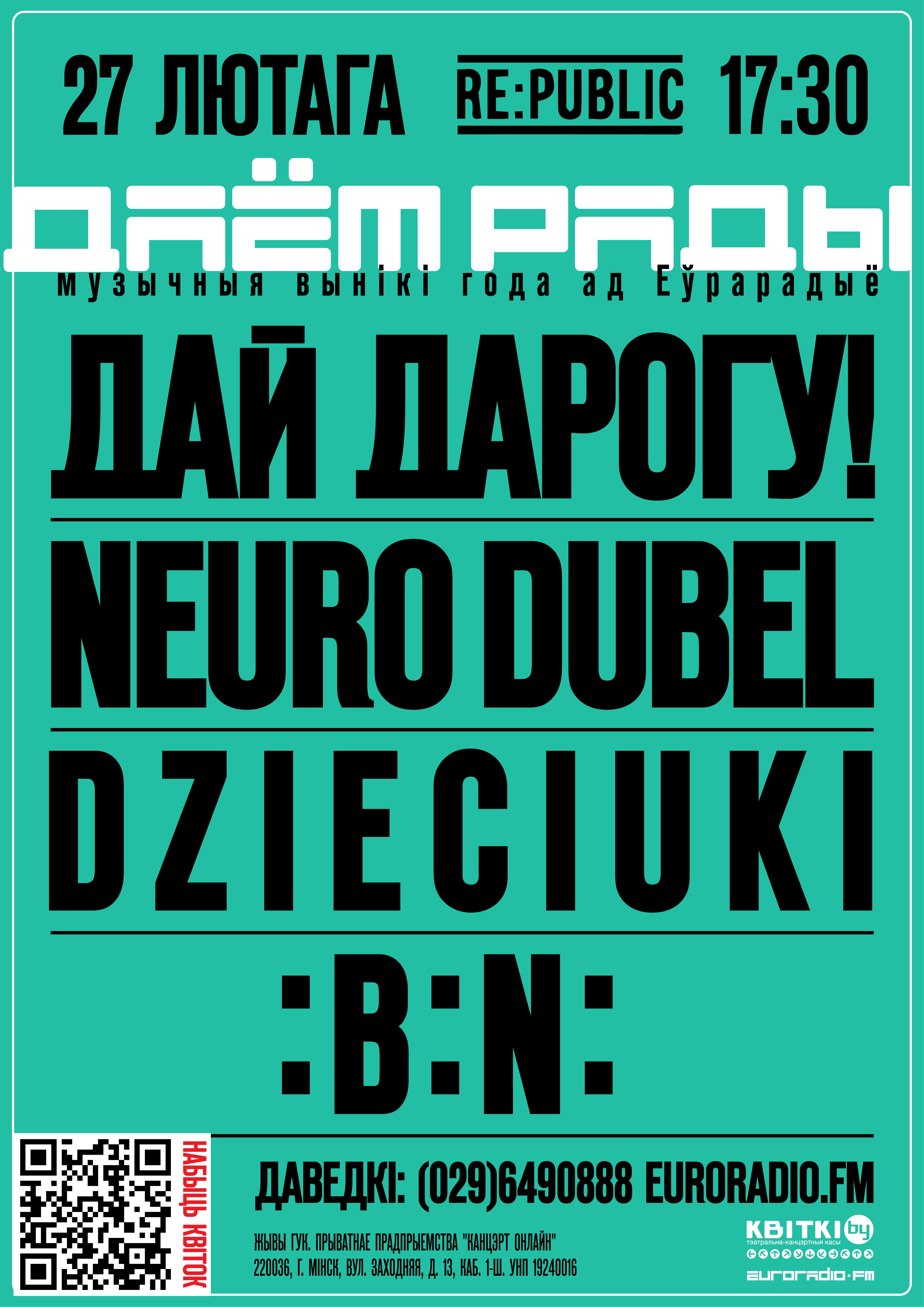 Афіша "Даём рады"